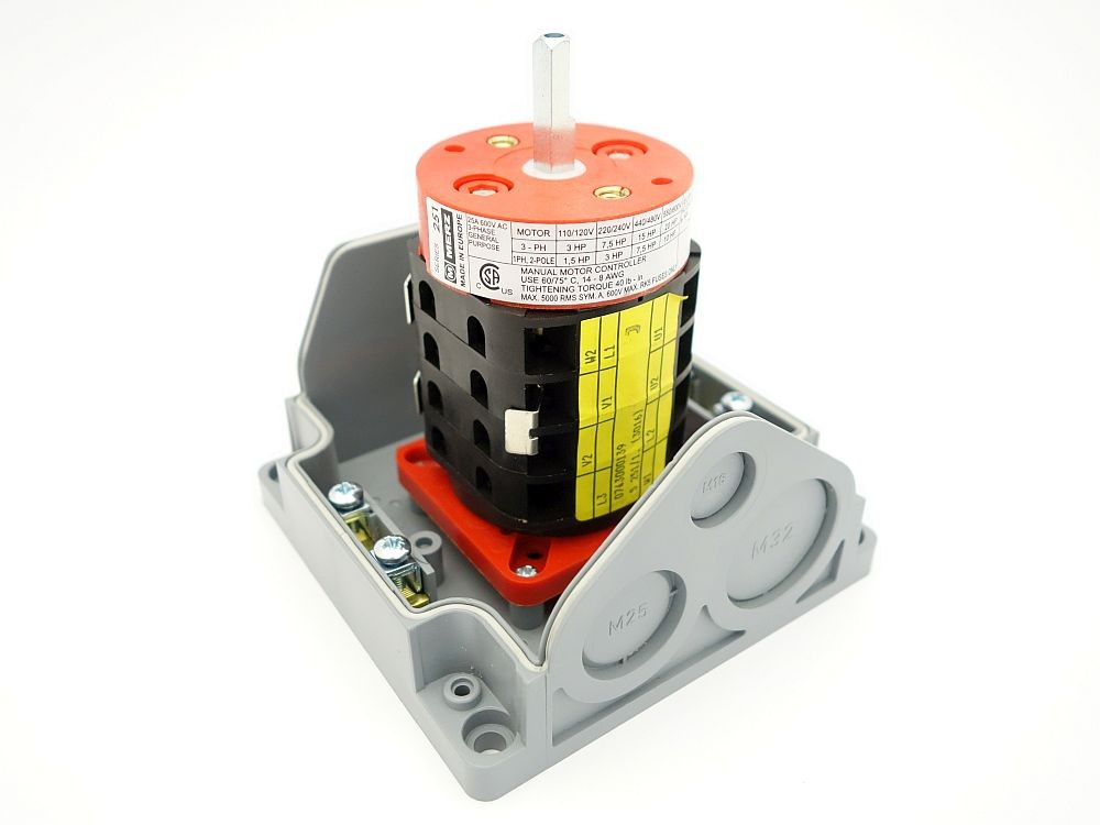 PCE MERZ switch. Modern switchgear, CAM-switch. 25A 600V AC version. S251/i2N1551